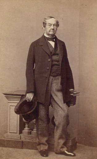 Ланской, Сергей Степанович